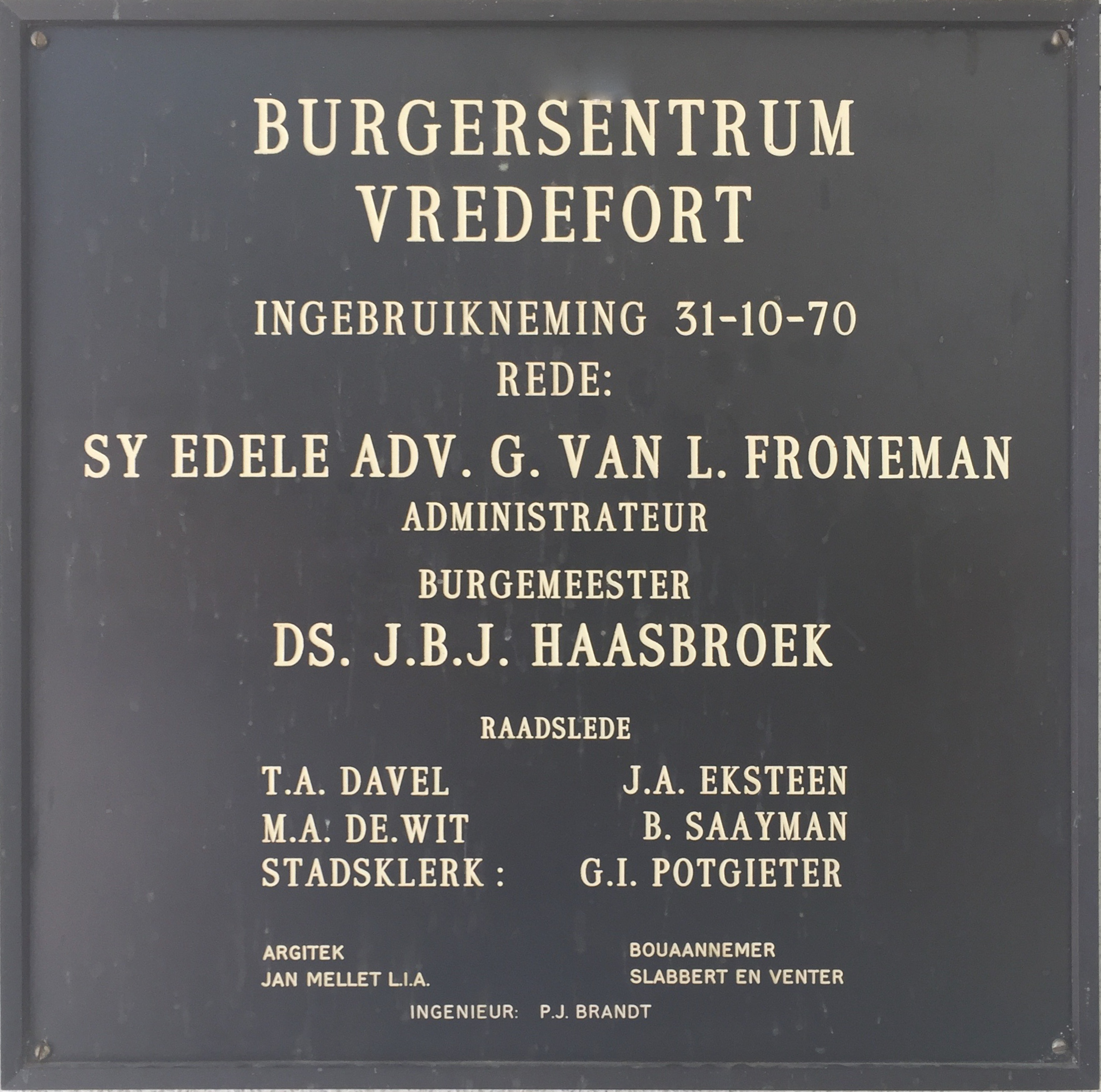 Muurplaat in die Vredefortse Burgersentrum